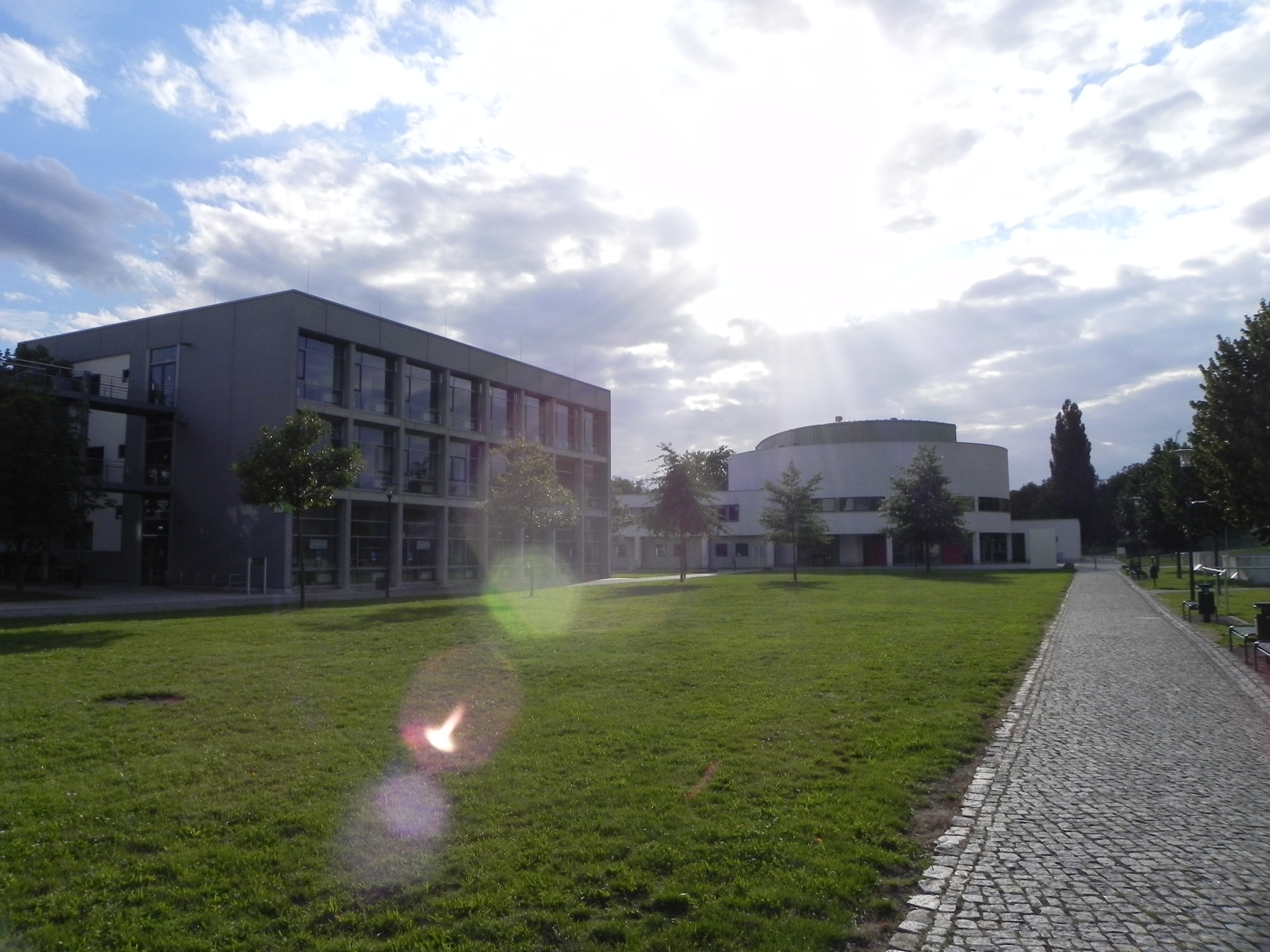 hs-magdeburg